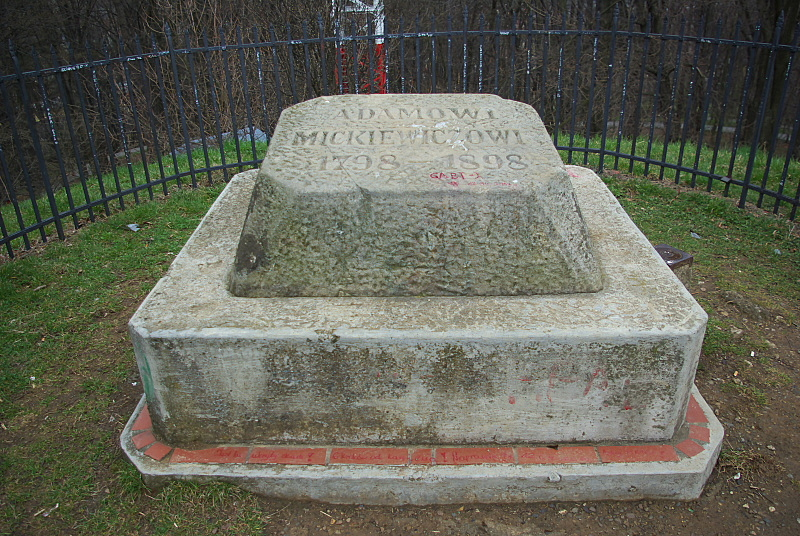 Kopiec Mickiewicza park Sanok